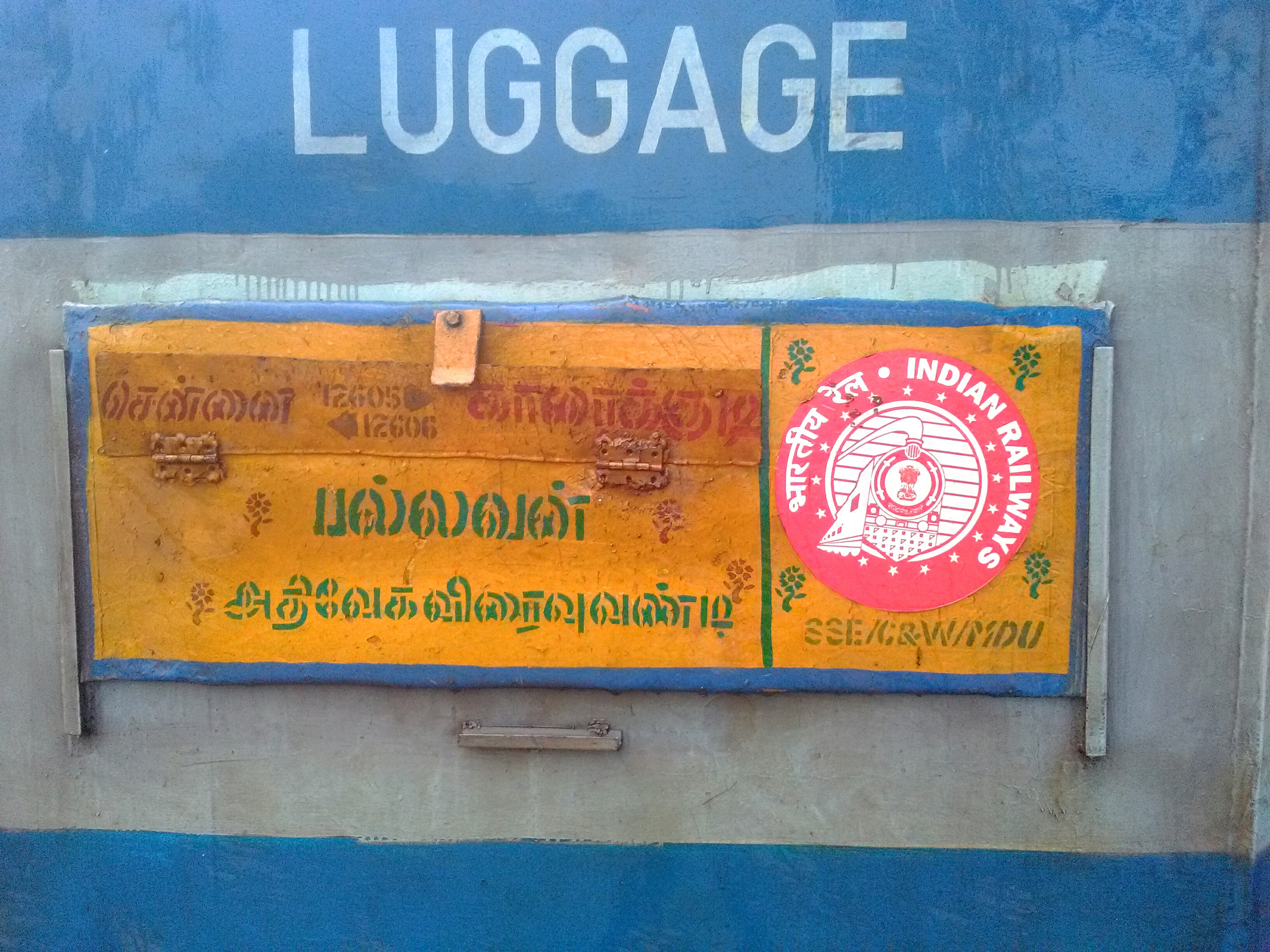 பல்லவன் விரைவு இரயிலில் உள்ள பெயர் பலகை.